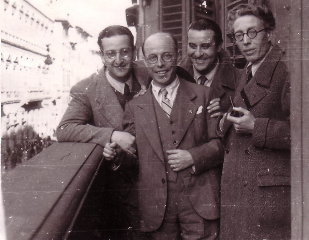 Pippo Barzizza, Alberto Rabagliati e Tito Petralia